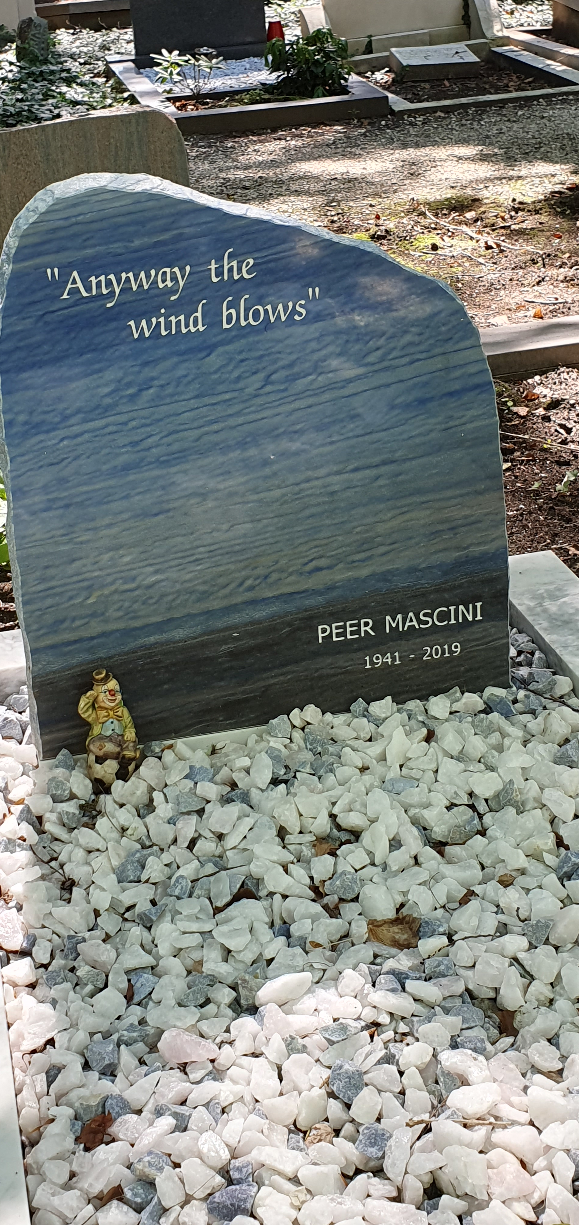 Graf van Peer Mascini op begraafplaats Zorgvlied, Amstelveen